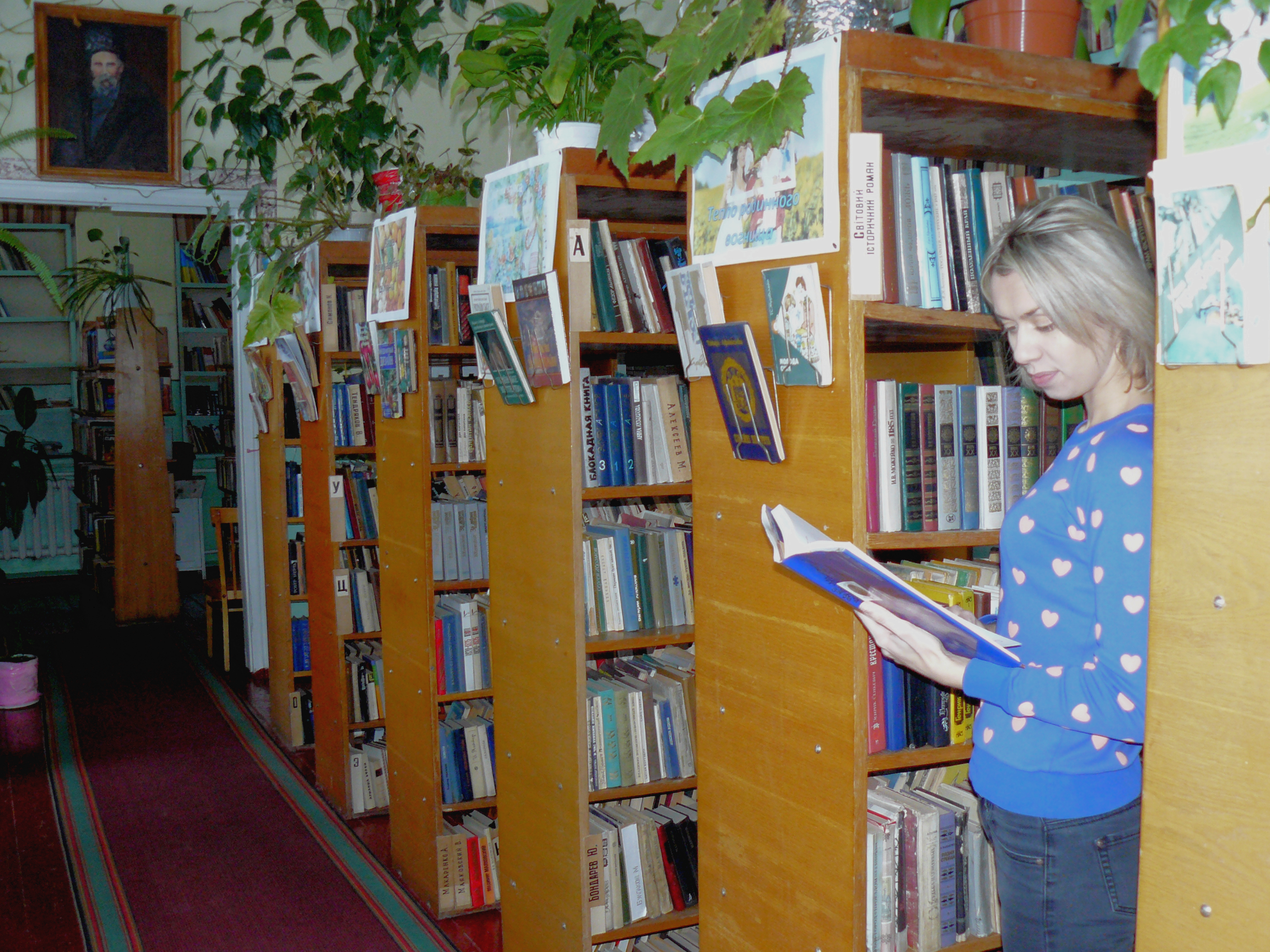 Читальна зала Кодимської центральної районної бібліотеки